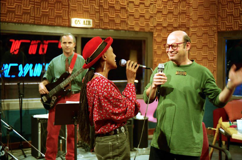 אולפן דורי באויר דורי בן זאב מסקי שיברו ארנון פלטי